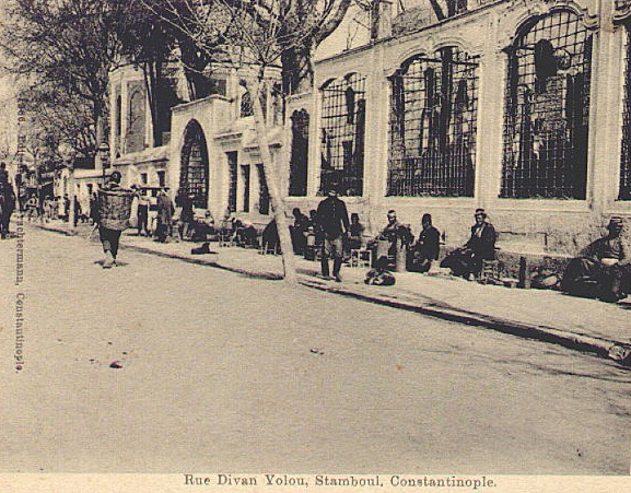 İstanbul Divanyolu'nun 1900 yılında çekilen tarihi fotoğrafı